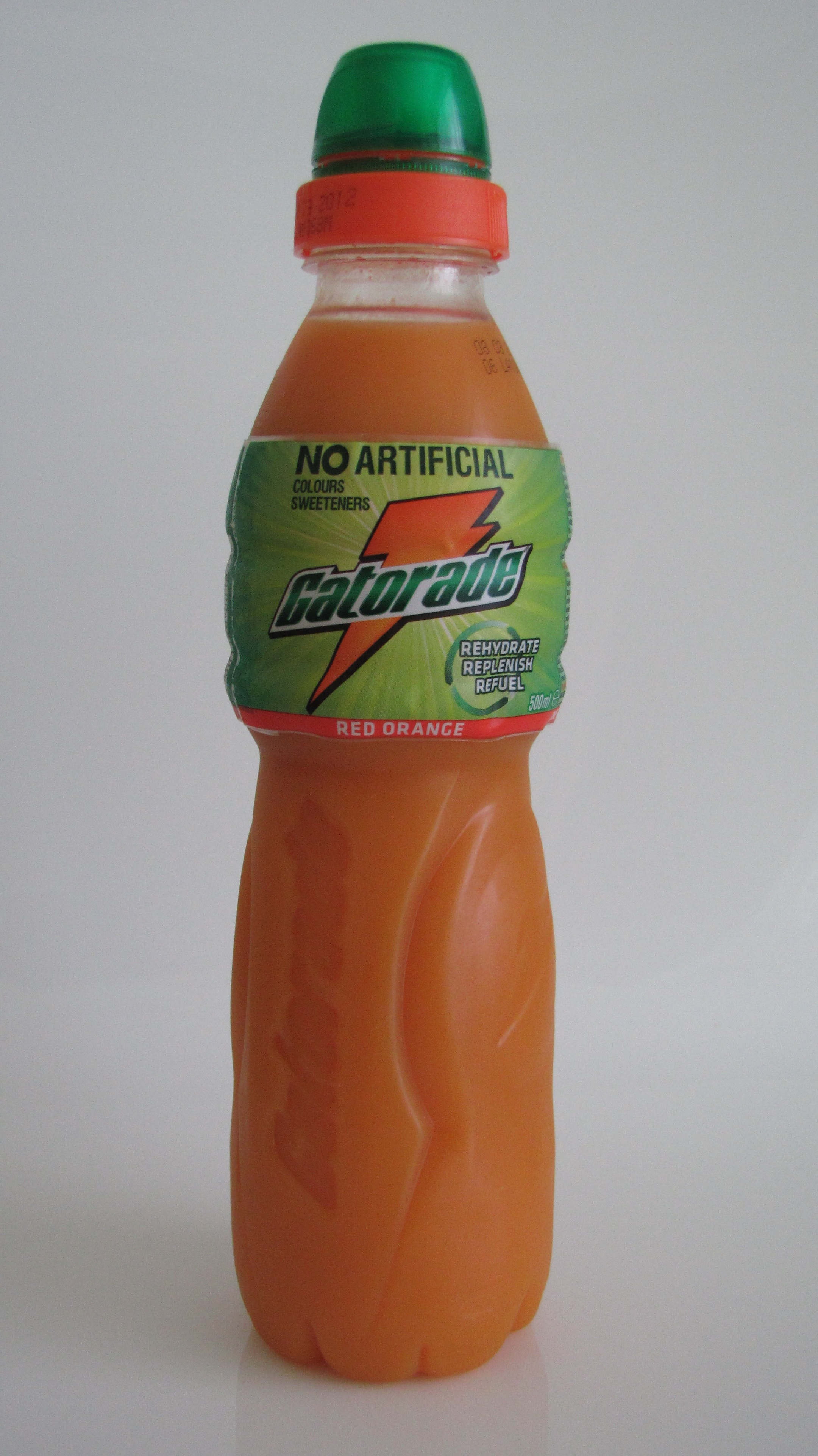 Gatorade® Thirst Quencher